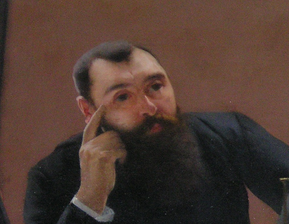 Portrait de Charles Féré (et non de Gilles de la Tourette). Détail du tableau d'André Brouillet "Une leçon clinique à la Salpêtrière", 1887 (huile sur toile 3 x 4.25 m, exposée au public dans les locaux de la faculté de médecine de Paris)